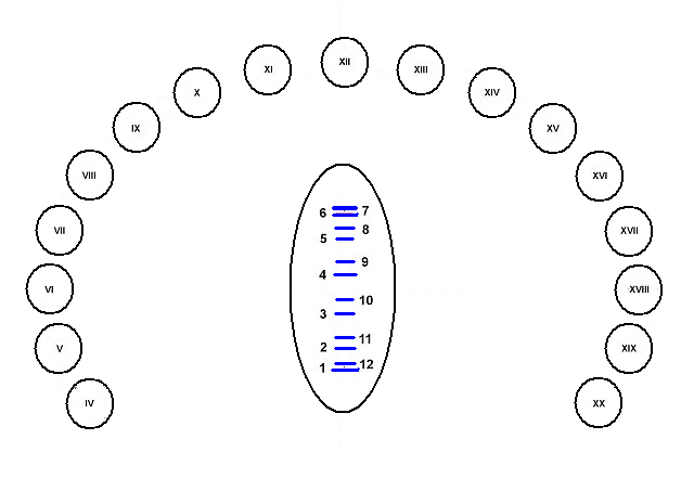 analematické hodiny